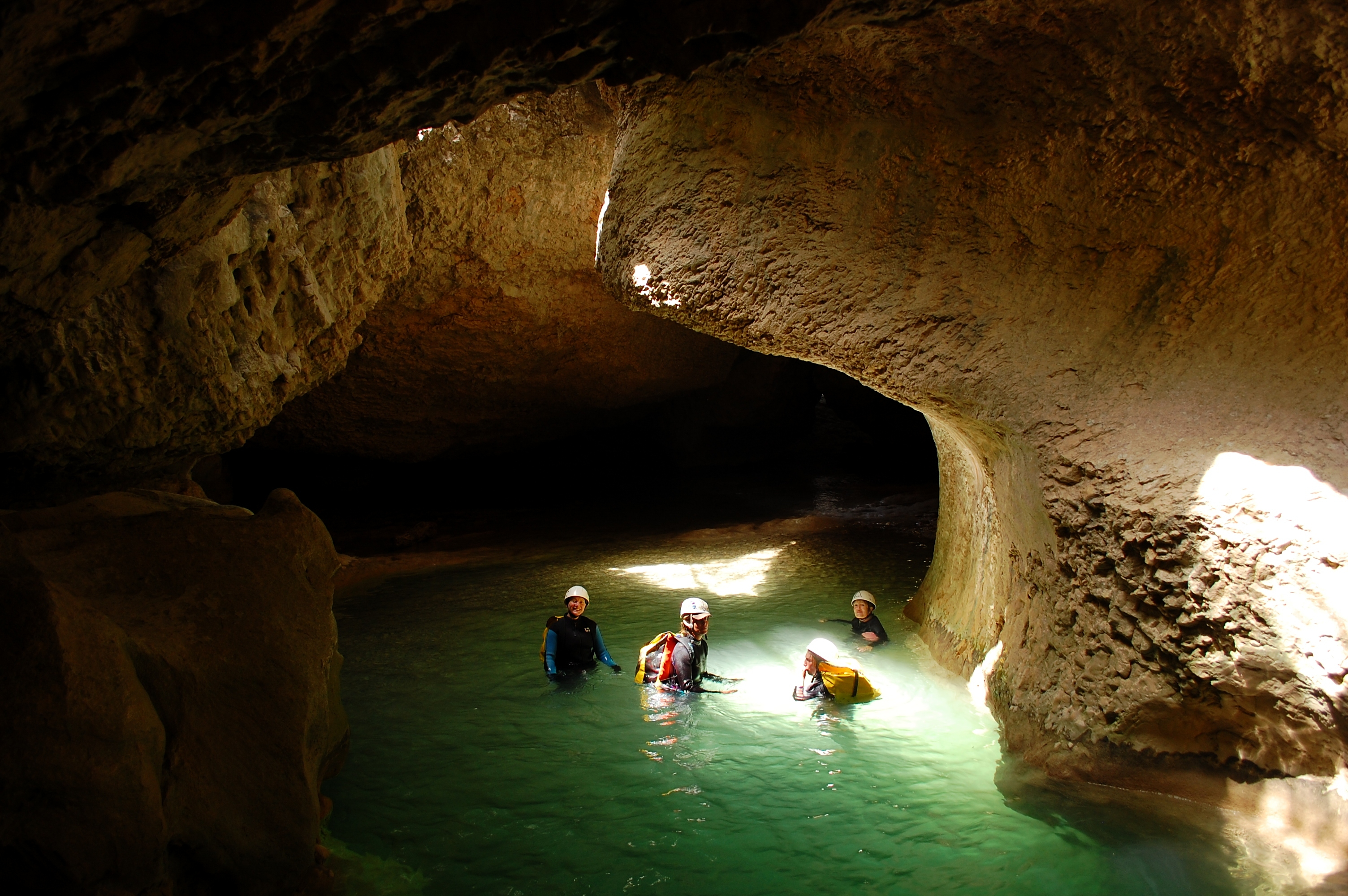 Sierra y Cañones de Guara This is a photography of a Special Area of Conservation in Spain with the ID: ES2410025. Natura2000 entry, EEA entry